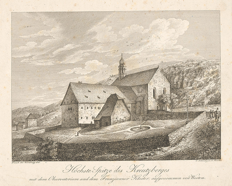 Johann Carl Schleich nach Johann Dauch: Höchste Spitze des Kreutzberges